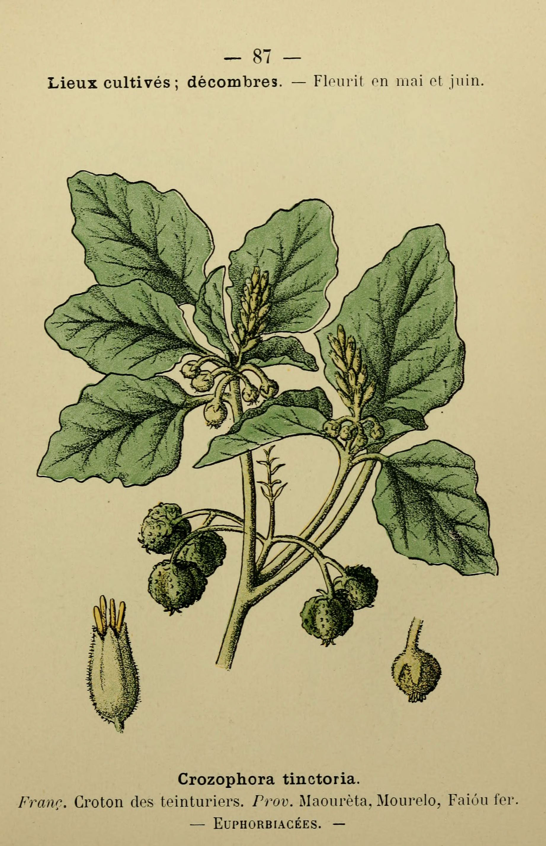 87 — Lieux cultivés; décombres. — Flourit on mai ot juin. Crozophora tinctoria. Franc. Croton des teinturiers. Prov. Maourèta. Mourelo, Faiùu fer — EUPHORBIAGÉES. —